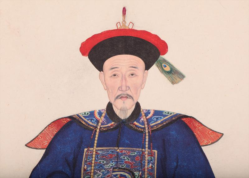 《御筆平定臺灣二十功臣像贊》中的鄂輝畫像，2014年由紐約iGavel拍賣行拍賣。